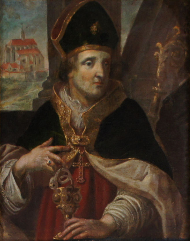 Porträtgemälde von Konrad III. der Sendlinger, Fürstbischof von Freising, im Fürstengang zwischen Fürstbischöflicher Residenz und Freisinger Dom.